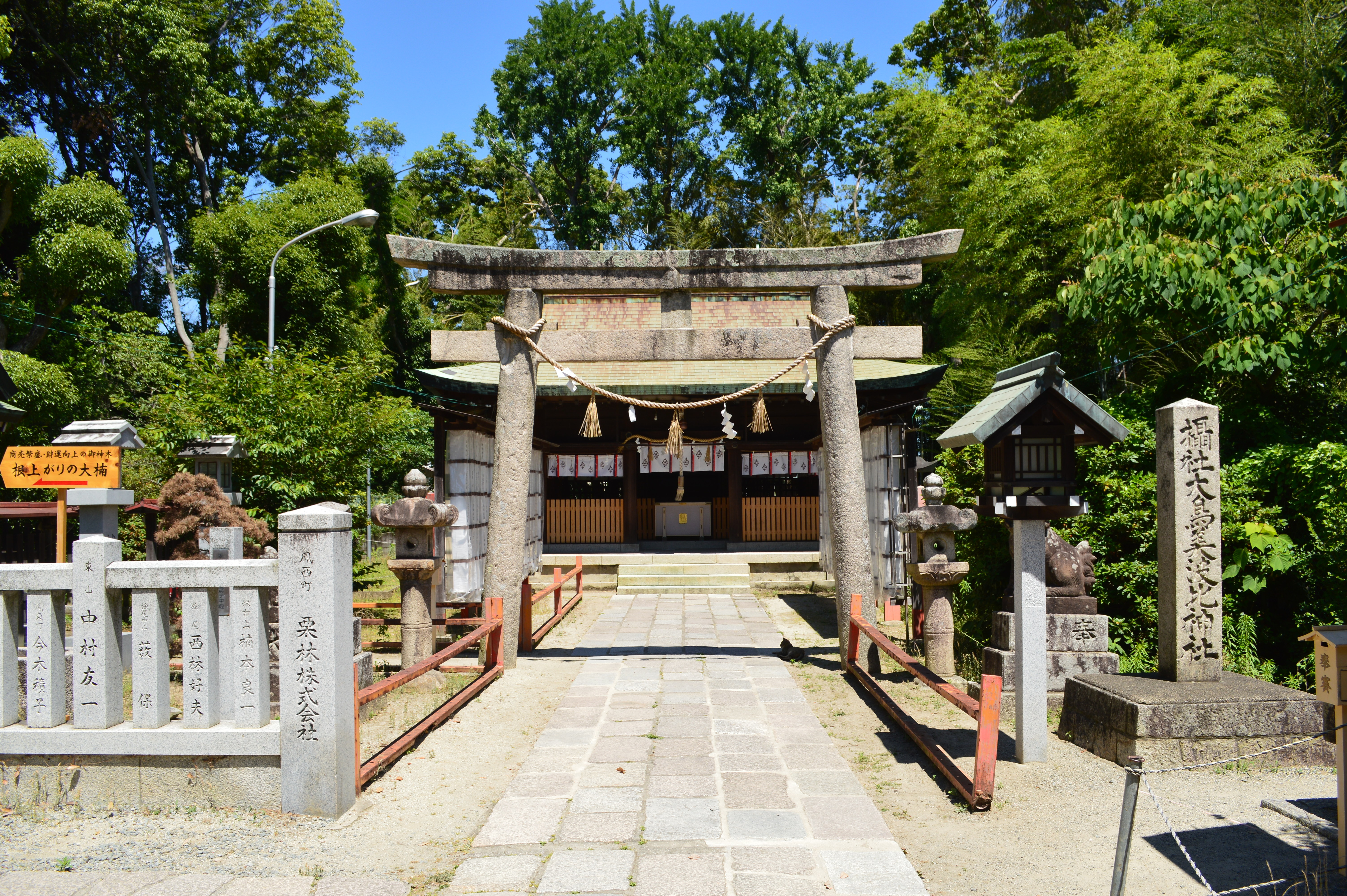 大鳥大社 境内大鳥美波比神社 鳥居 Nikon D3200